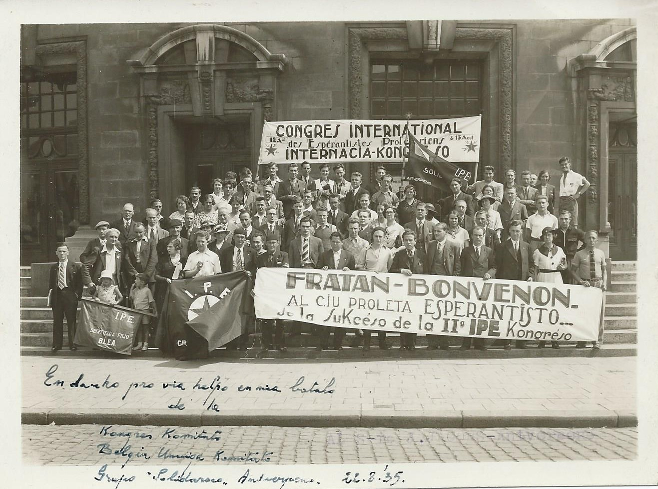 Kongreso de Internacia Proleta Esperantistaro (IPE) en Antverpeno en 15-15 aŭgusto 1935; foto farita antaŭ la operdomo